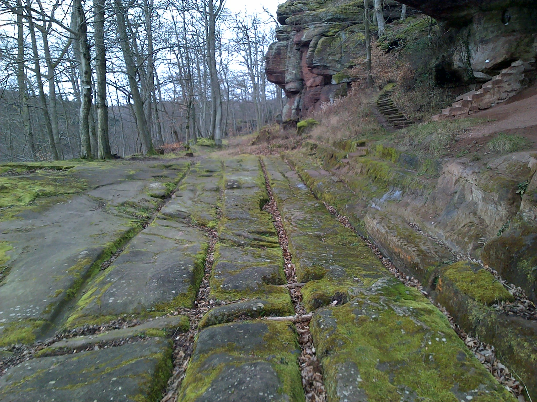 Col de Saverne - Randonnée Club Vosgien -Ornières de la route des évêques